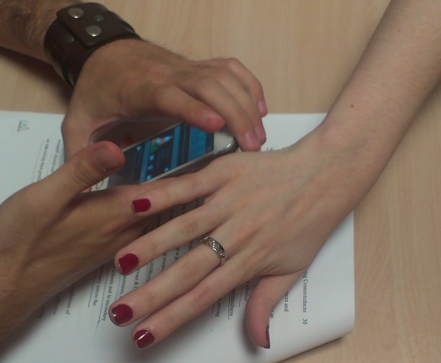 Spoštovanje drugih - uporaba mobilnega telefona